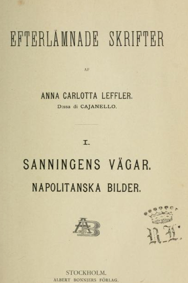 Efterlämnade skrifter